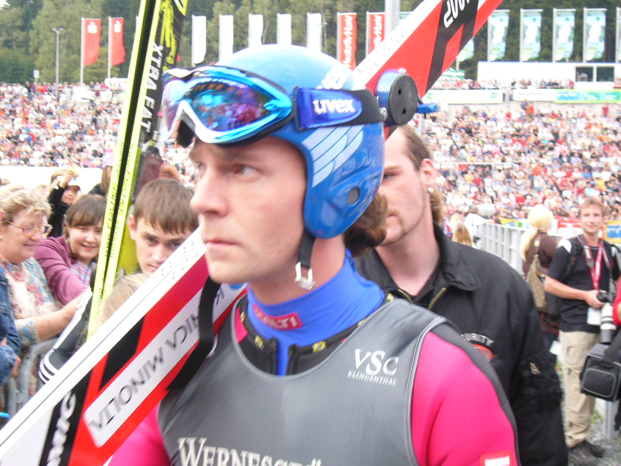 Sommer-Grand Prix in der Vogtlandarena am Schwarzberg in Klingenthal/Sa. 2007